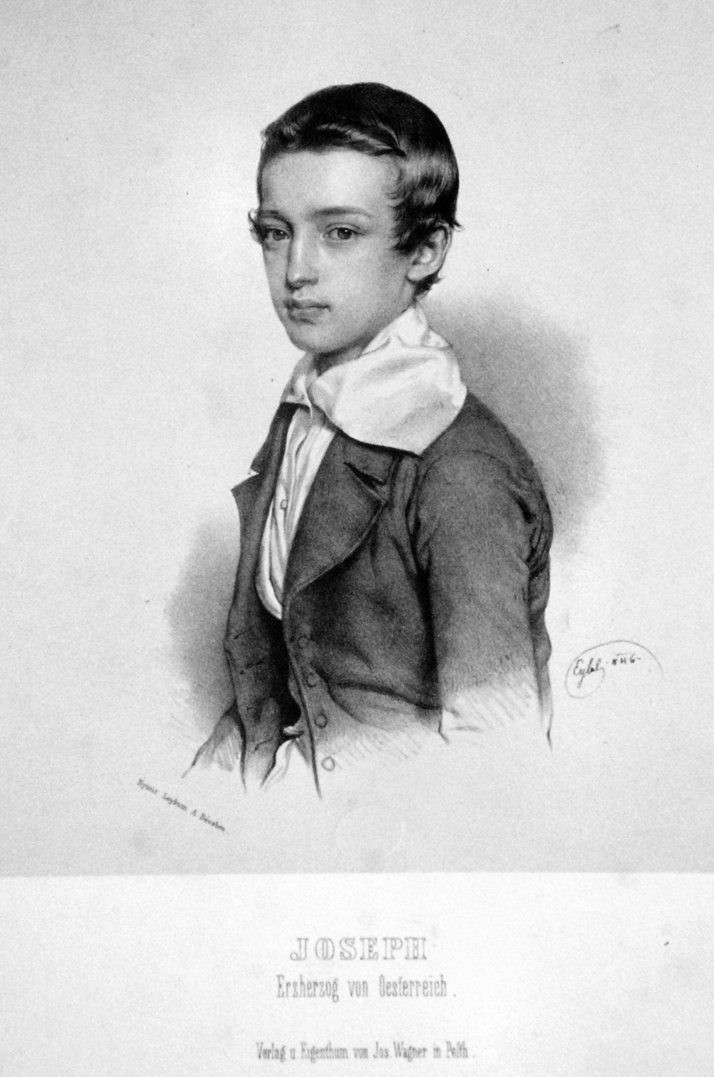 Josef Karl Ludwig (1833-1905), Erzherzog von Österreich, General der Kavallerie. Lithographie von Franz Eybl, 1846